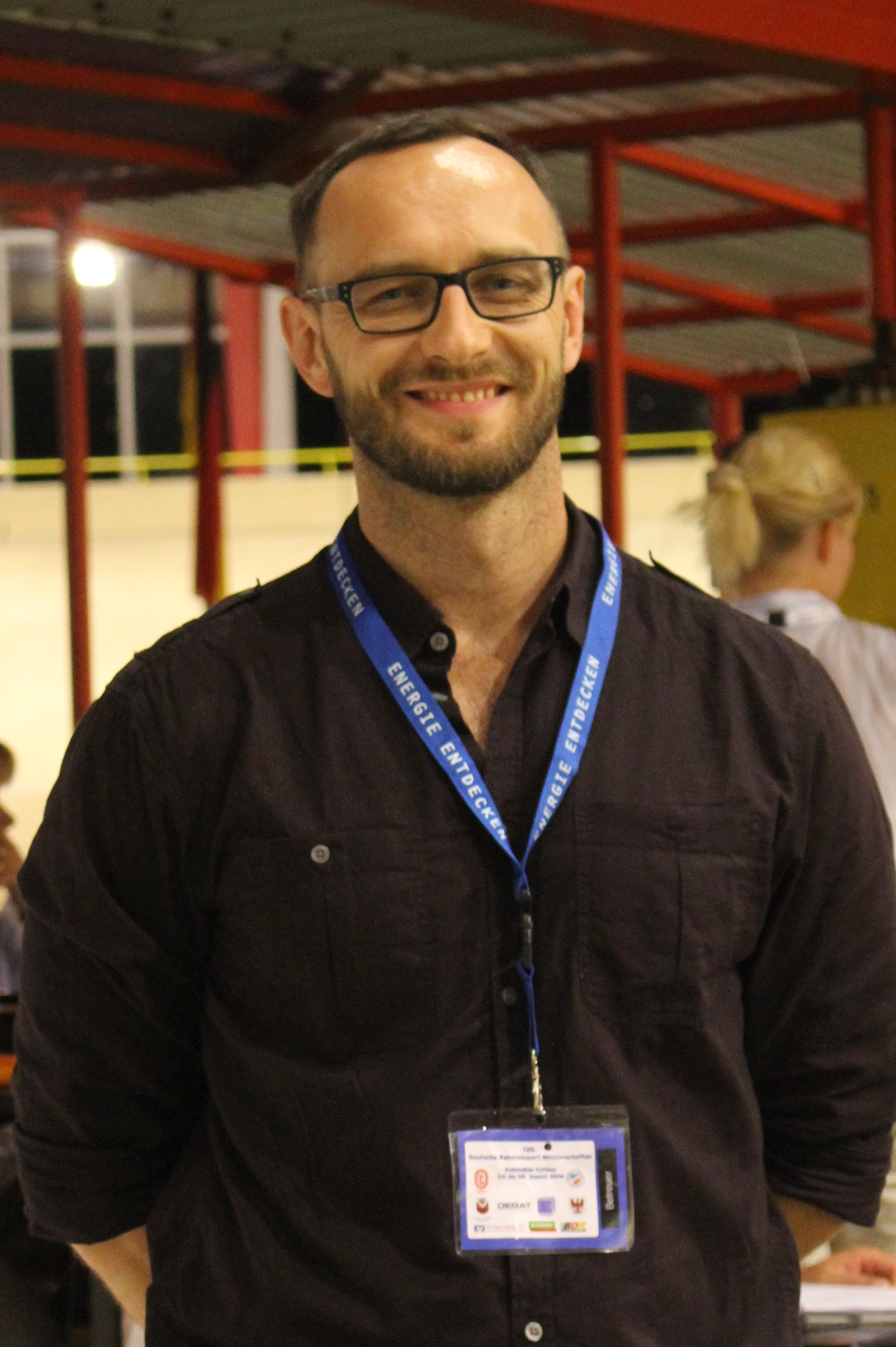 Valts Miltovics, lettischer Sportmanager